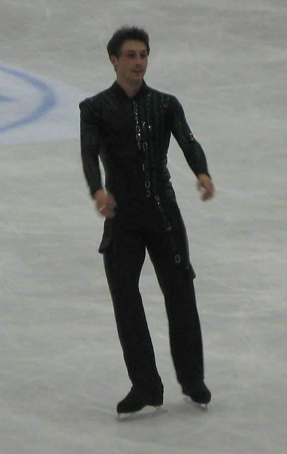 Brian Joubert au gala des Championnats du monde de patinage artistique 2012 à Nice.